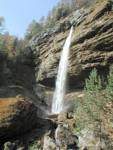 Peričnik v poletnem času